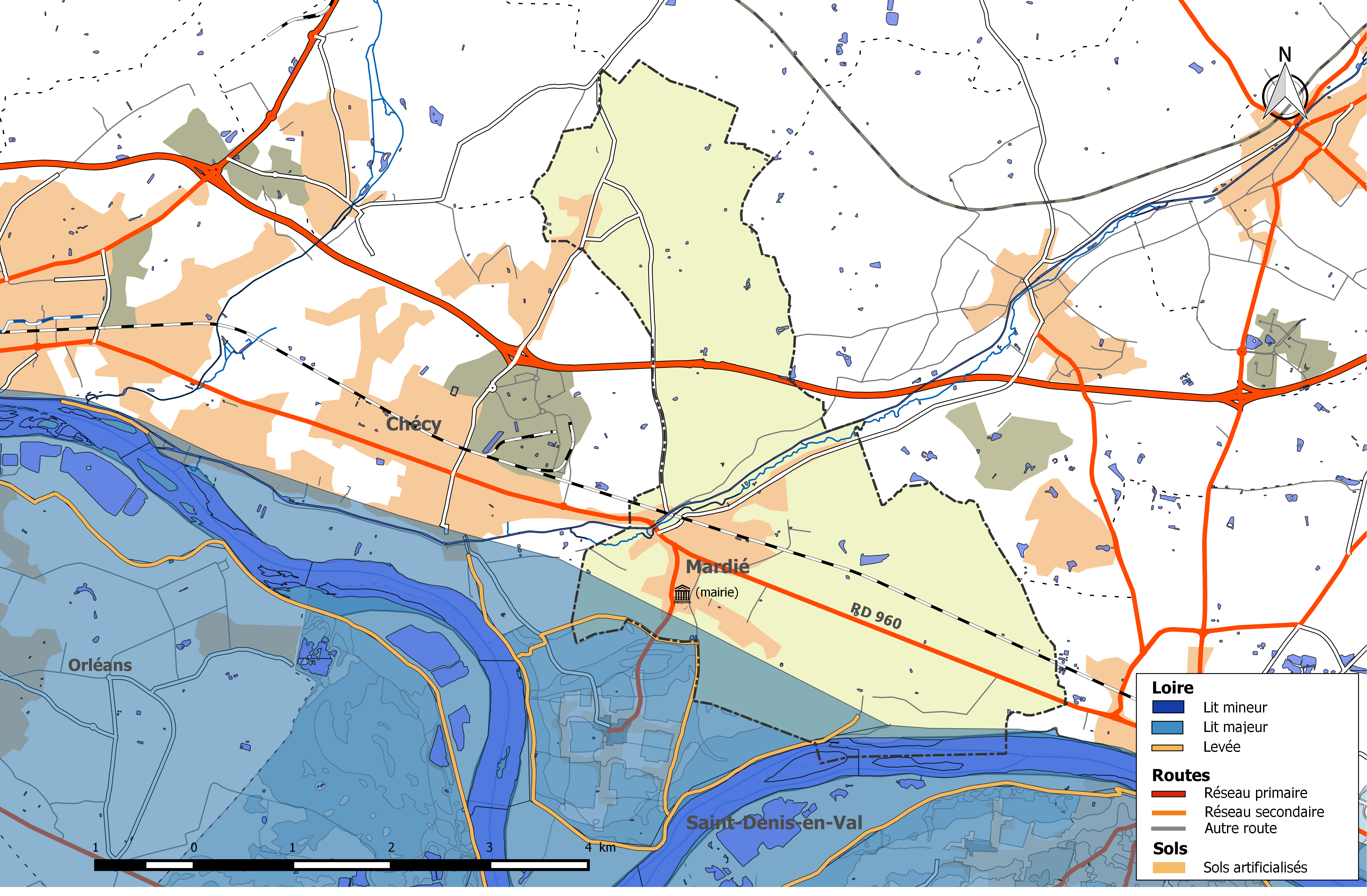 Zone inondable et réseaux hydrographique et routier de la commune des Mardié.